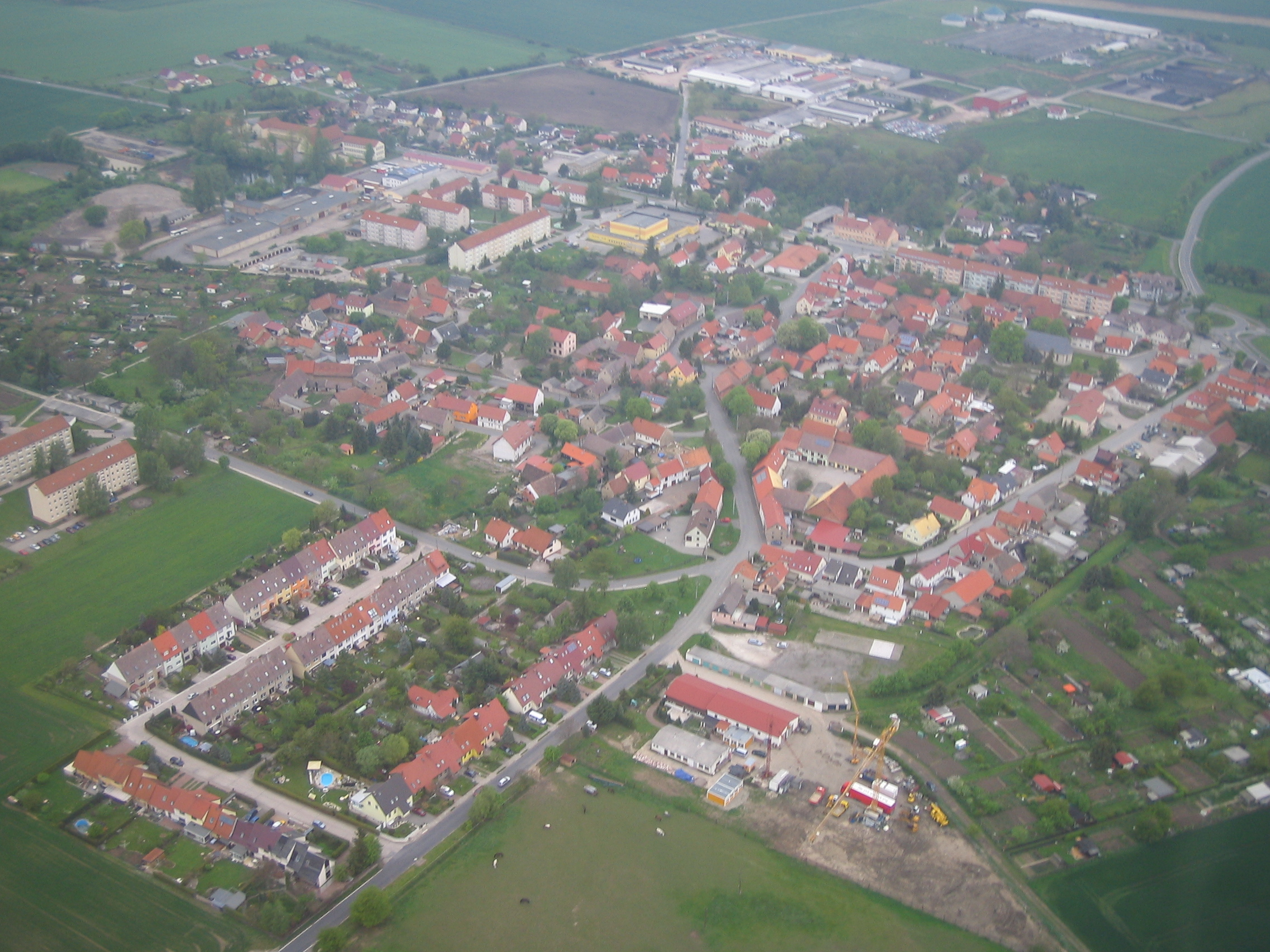 Luftaufnahme von Berlstedt (Mai 2010)